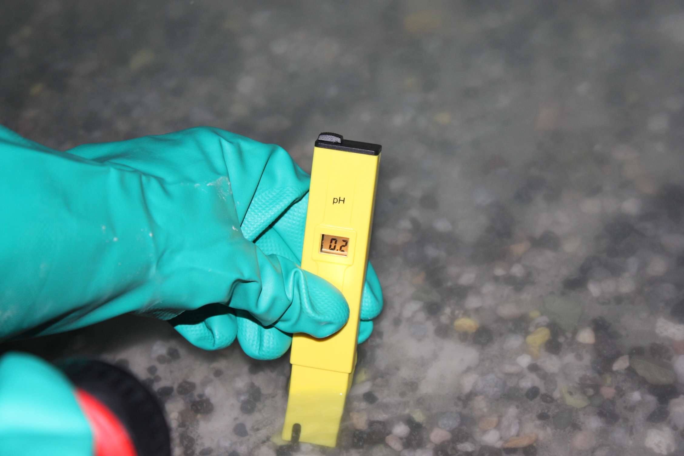 pH mesuré le 16 Juillet 2012 à 3h45 du matin sur la berge du lac d'acide du Kawah Ijen (Indonésie)